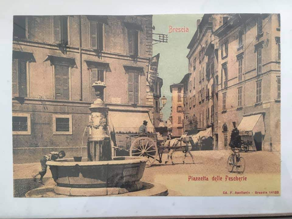 Una veduta del quartiere medievale delle pescherie in una cartolina, prima della sua demolizione